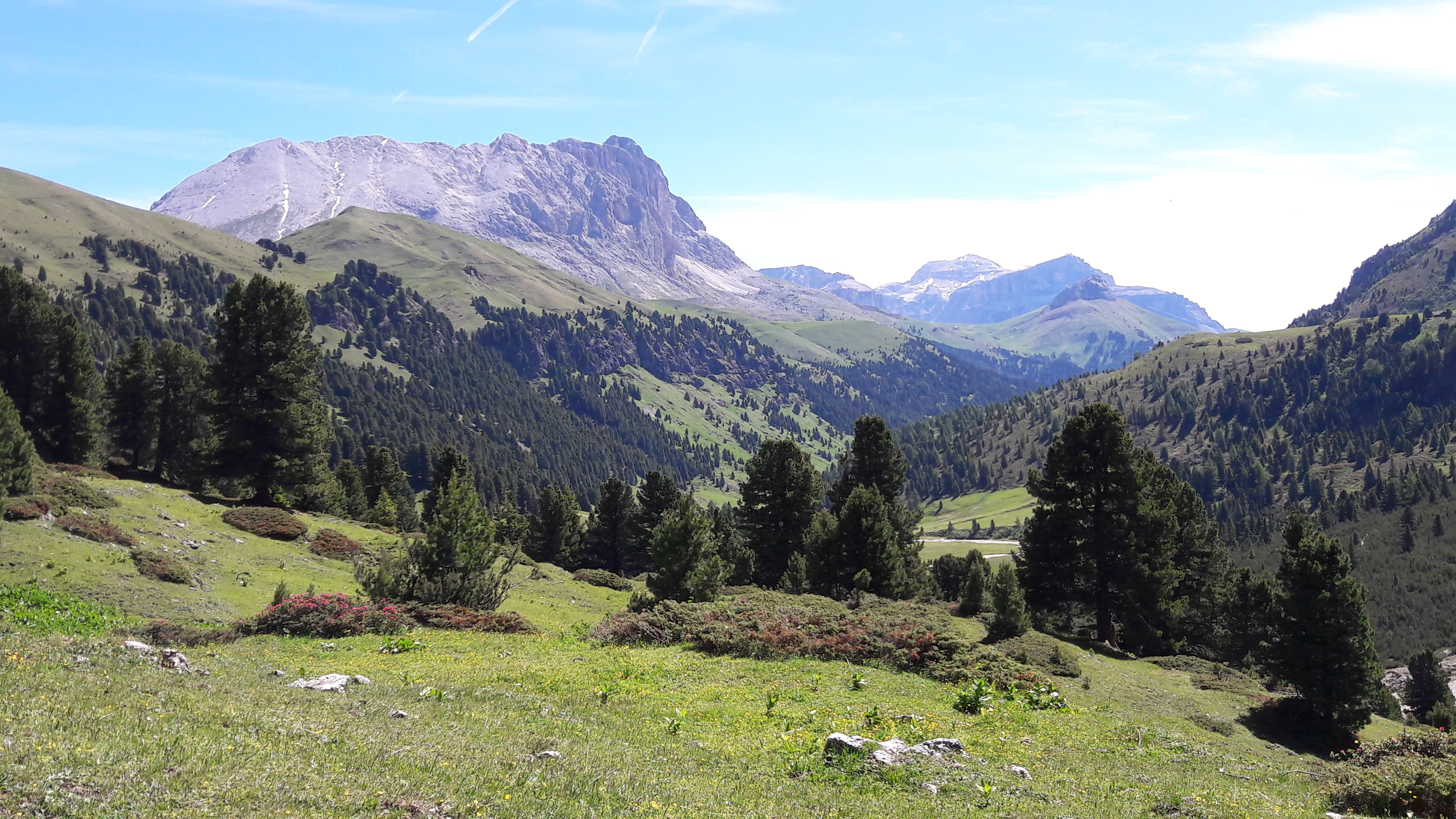 Val Duron (Q49967532)